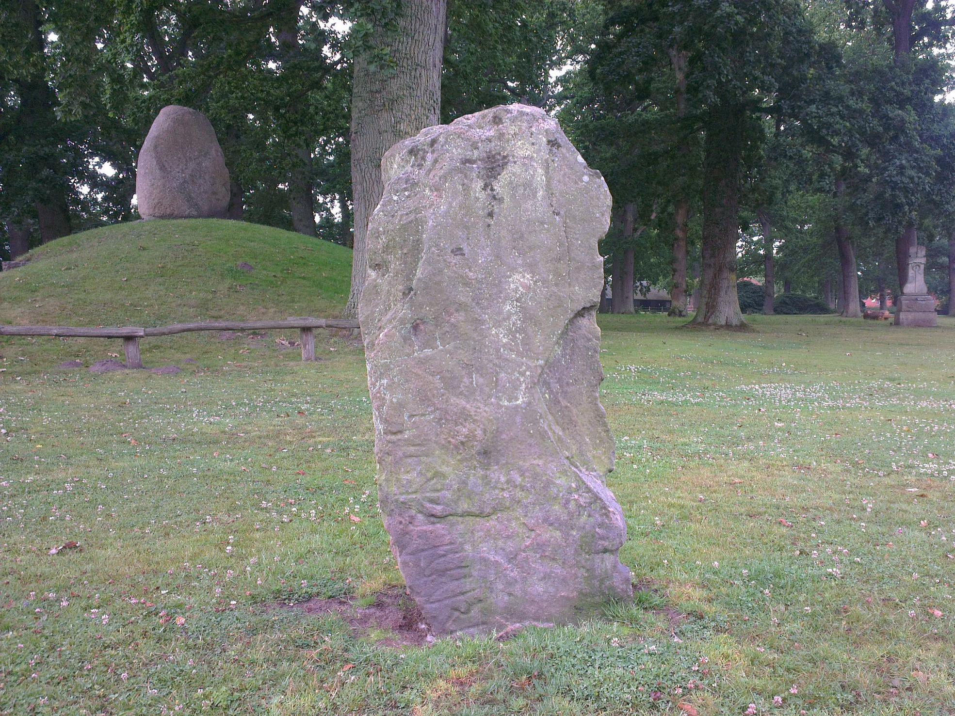 Flemløse-stenen 2 står i Jægerspris Slotspark